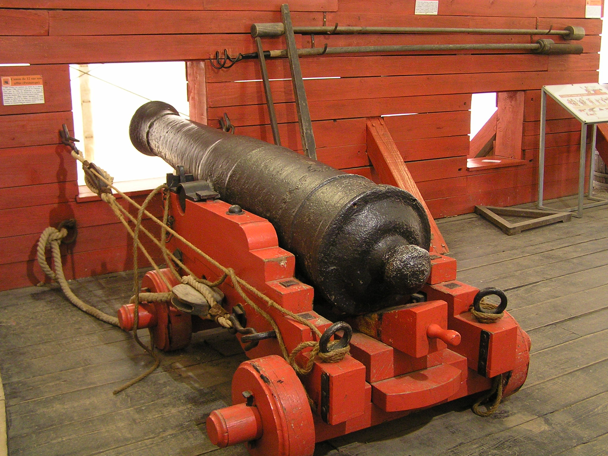 Canon Historique de l'Hermione Canon de 12 Livres, Chantier de l'Harmione à Rochefort en Charente-Maritime